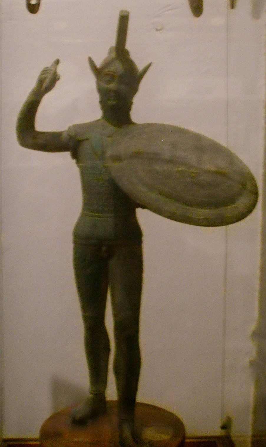 Bronzetto etrusco di guerriero. Museo archeologico di Firenze.